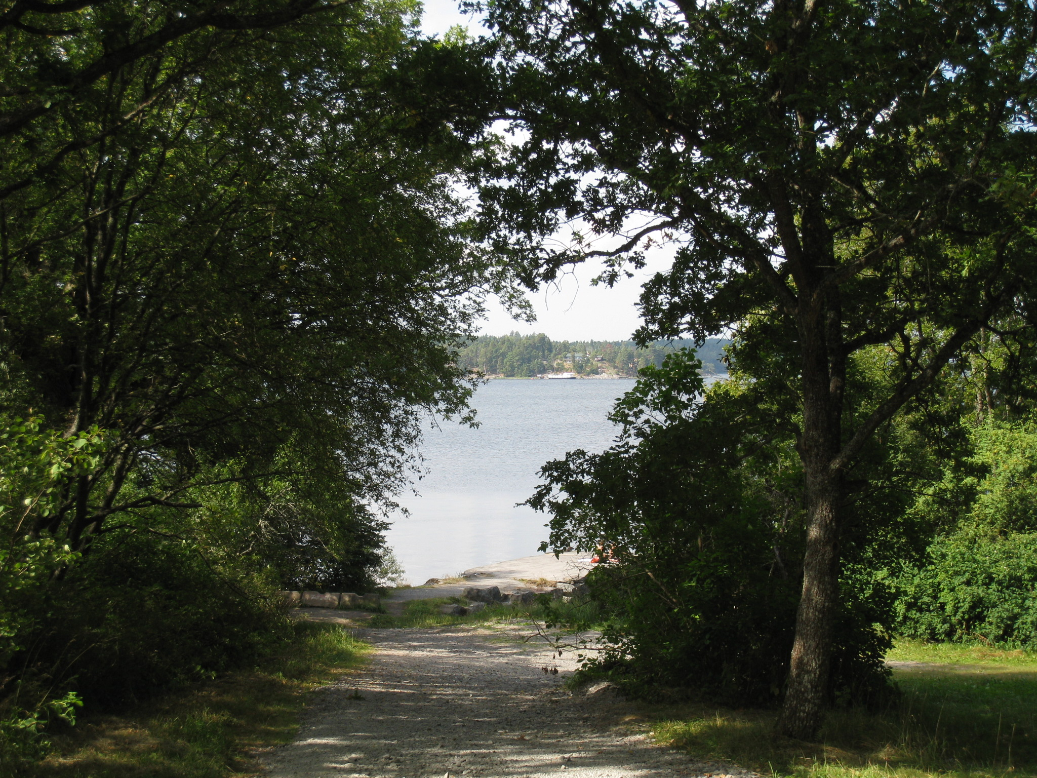 Sandviks gård i Görvälns naturreservat i Järfälla kommun, Stockholms län. Vägen ner till badviken.